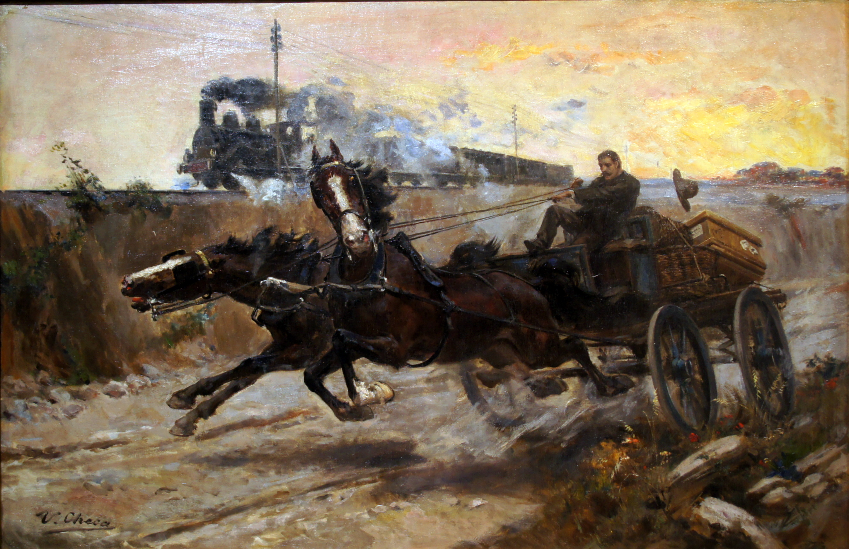 Desafortunado encuentro. Óleo sobre lienzo. 60,4 x 92 cm.